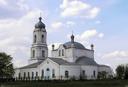 Храм Михаила Архангела село Фащевка Липецкой области